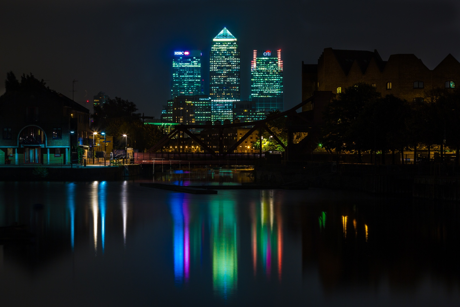 Кэнэри-Уорф